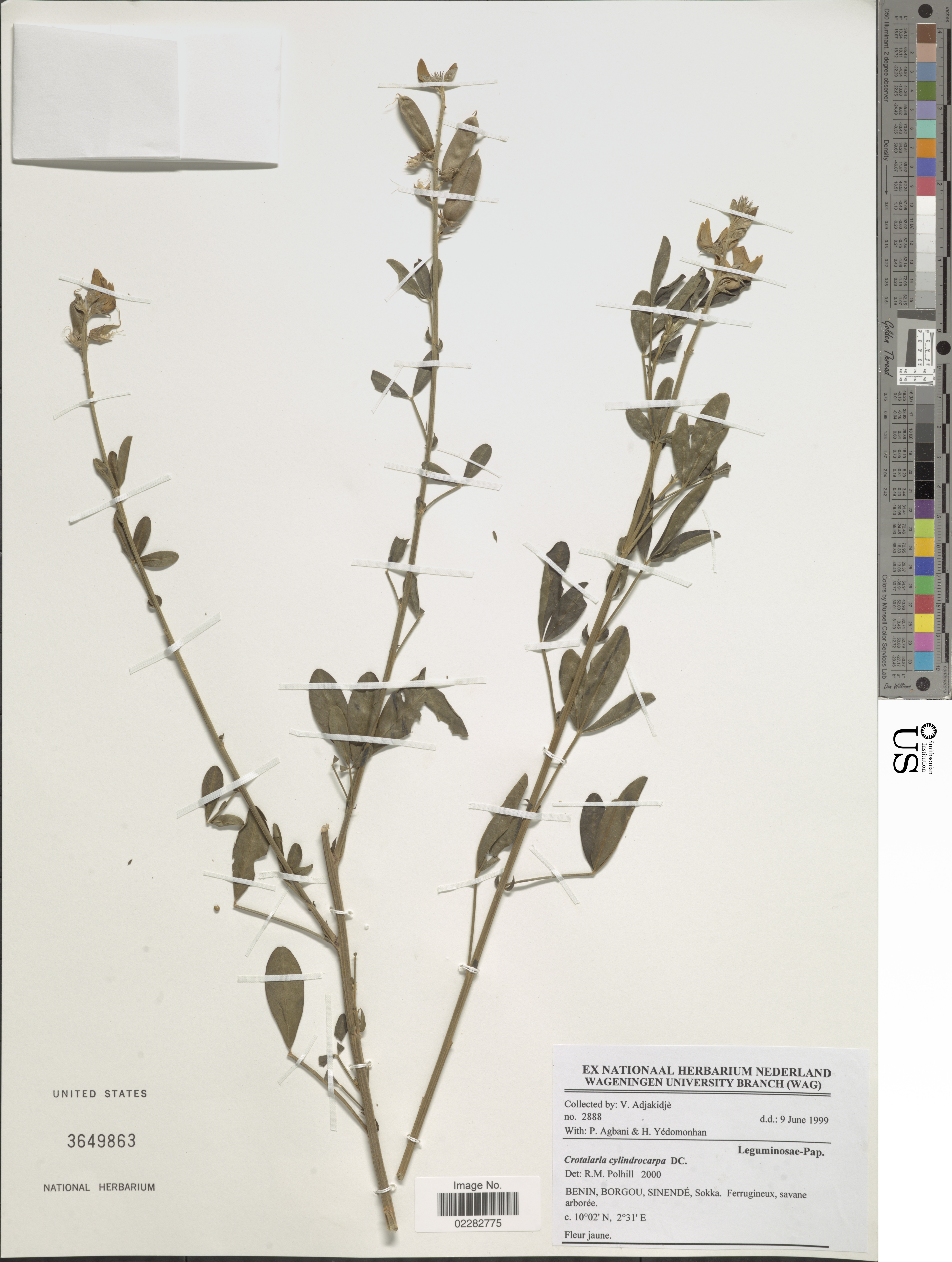 Crotalaria cylindrocarpa DC. Object Details Biogeographical Region 22 - West Tropical Africa Collector V. Adjakidjè P. Agbani H. Yedomonhan Record Last Modified 29 Dec 2017 Specimen Count 1 Collection Date 9 Jun 1999 Barcode 02282775 USNM Number 3649863 Place Sinende, Sokka., Borgou, Benin, Africa Published Name Crotalaria cylindrocarpa DC. Taxonomy Plantae Dicotyledonae Rosales Fabaceae Faboideae NMNH - Botany Dept. Record ID nmnhbotany_13303472 Usage of Metadata (Object Detail Text) CC0 GUID (Link to Original Record)